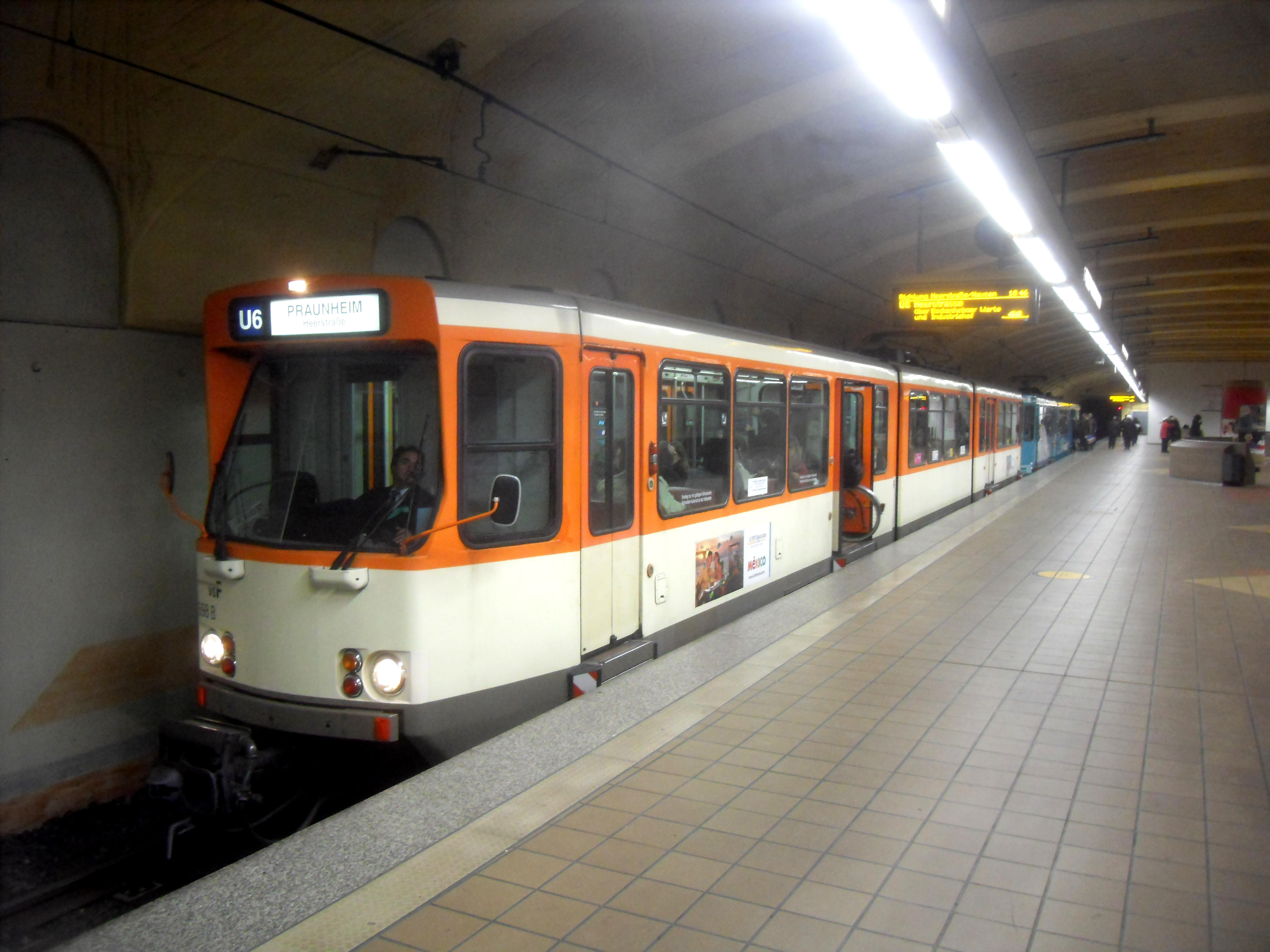 U-Bahn-Wagen des Types Ptb der U-Bahn Frankfurt am Main im U-Bahnhof Alte Oper auf der Linie U 6 auf dem Weg nach Praunheim Heerstraße in Hessen (Deutschland)